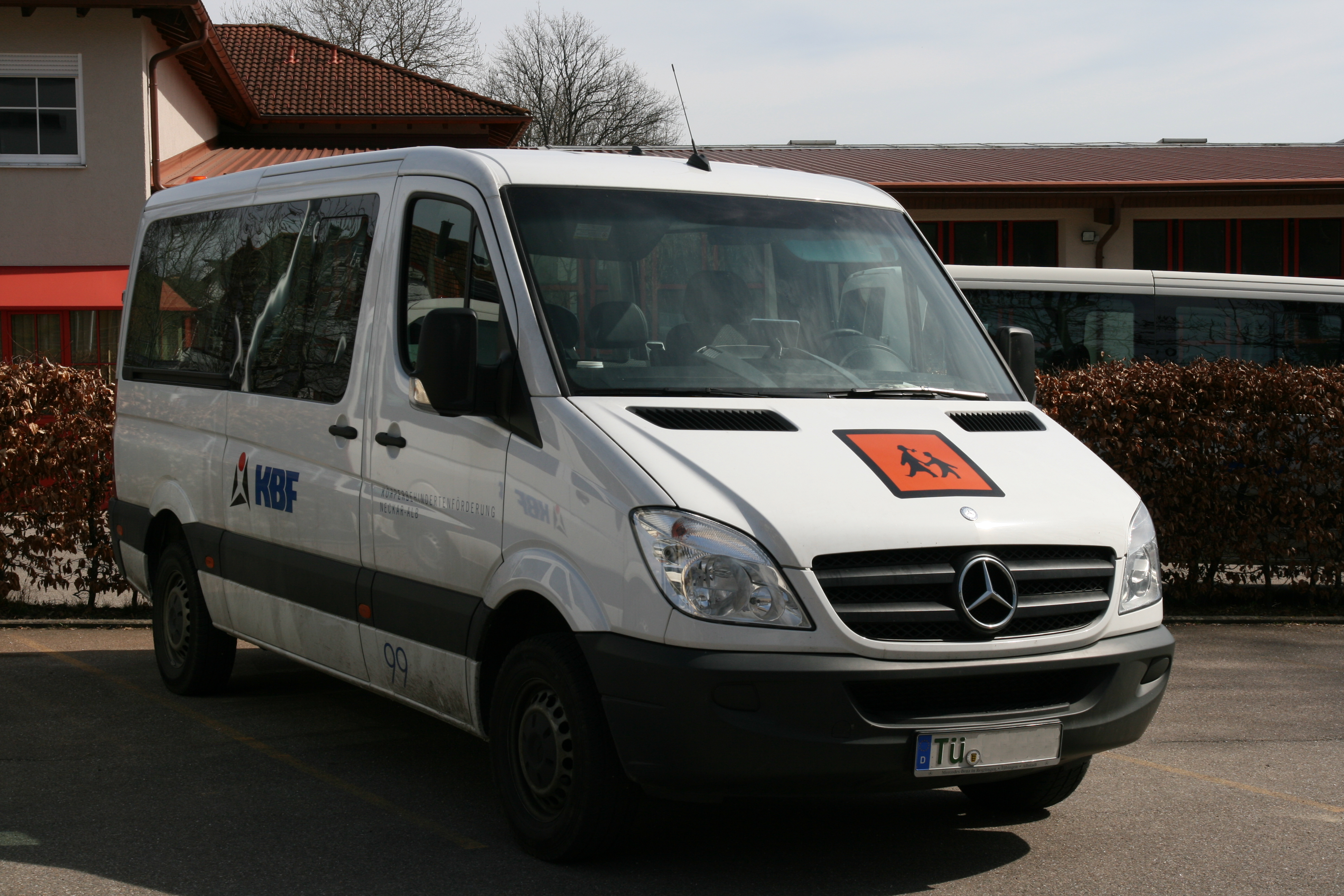 Fahrzeug (Sprinter) der Körperbehindertenförderung Neckar-Alb für den Personentransport